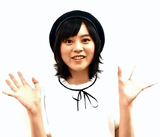 中島由貴（声優）